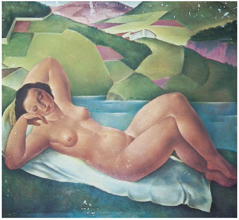 “Desnudo” Jenaro Urrutia